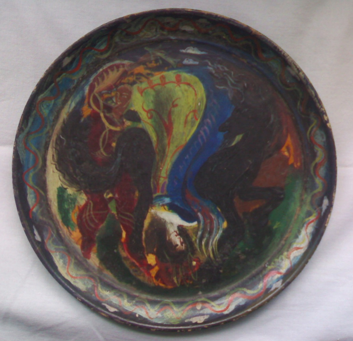 papier-mâché tray by Leslie Hurry